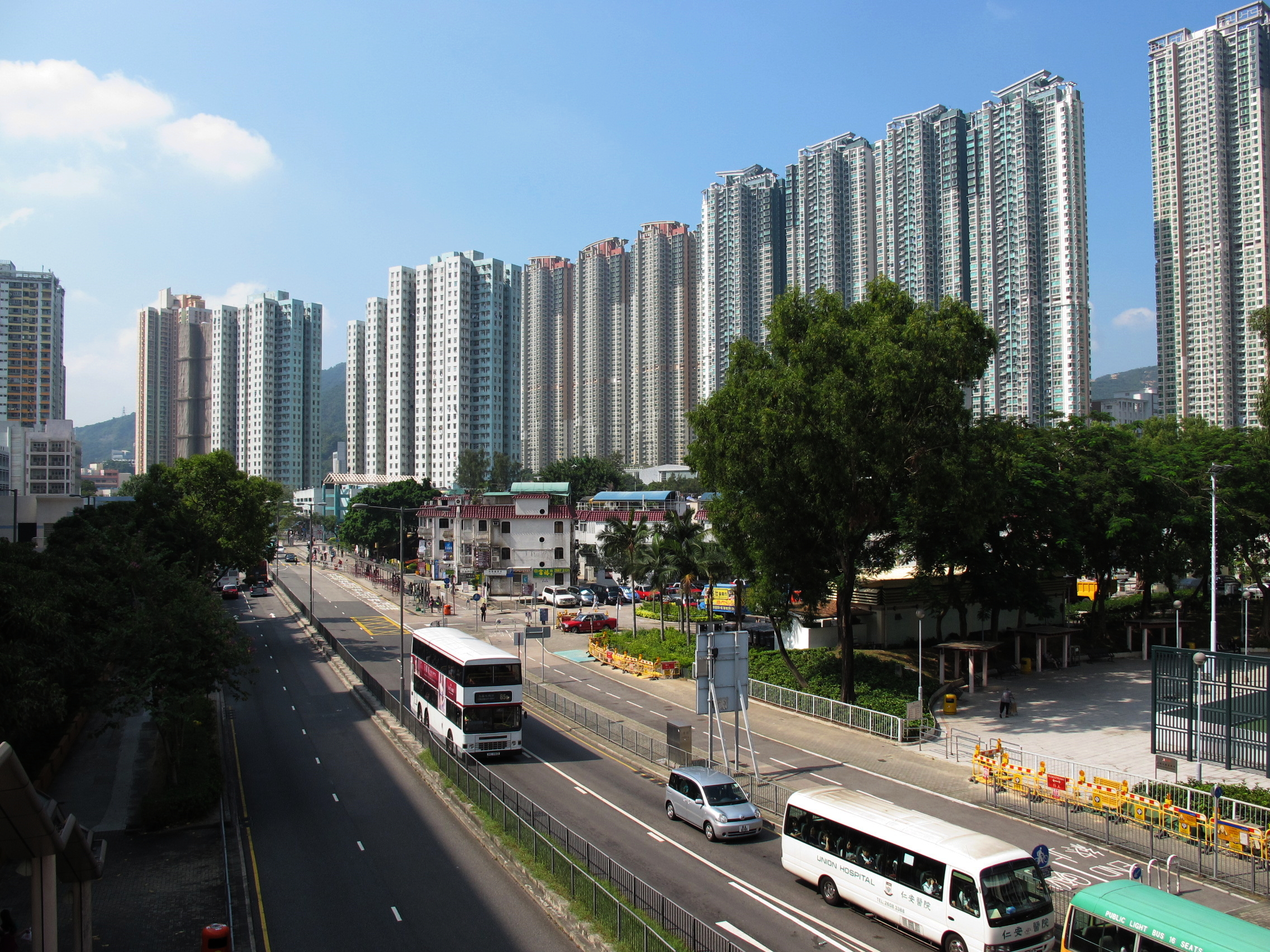 Tim Sam Street 田心街